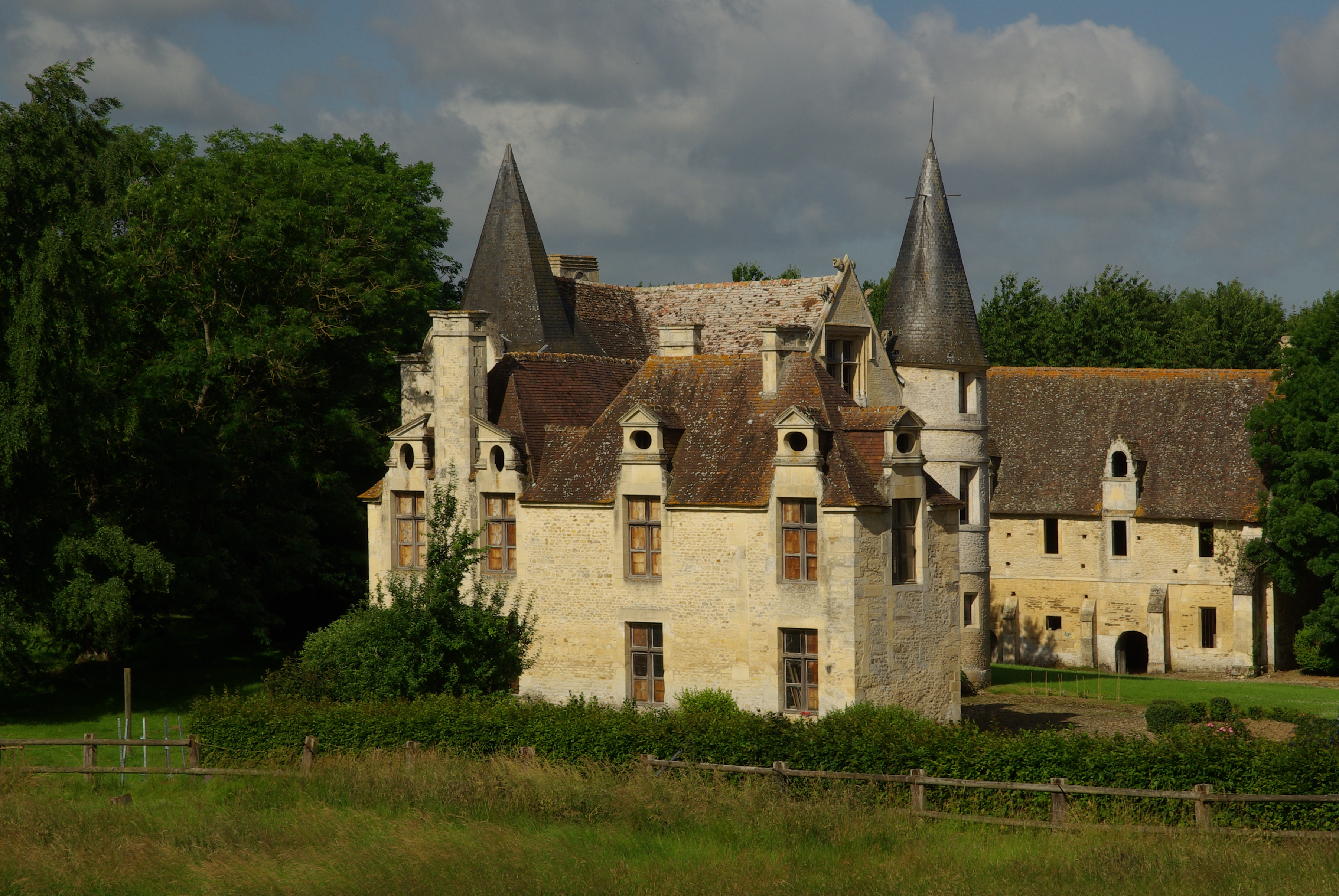 Le chateau de Quilly (XVIè et XVIIème) à Bretteville-sur-Laize, Calvados.